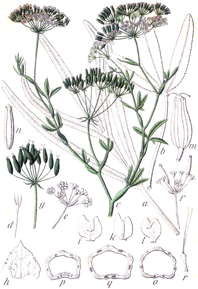 Falcaria vulgaris Bernh., syn. Falcaria rivini Host Original Caption Sichelmöhre, Falcaria rivini